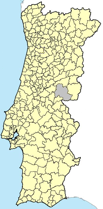 Concelho Castelo Branco